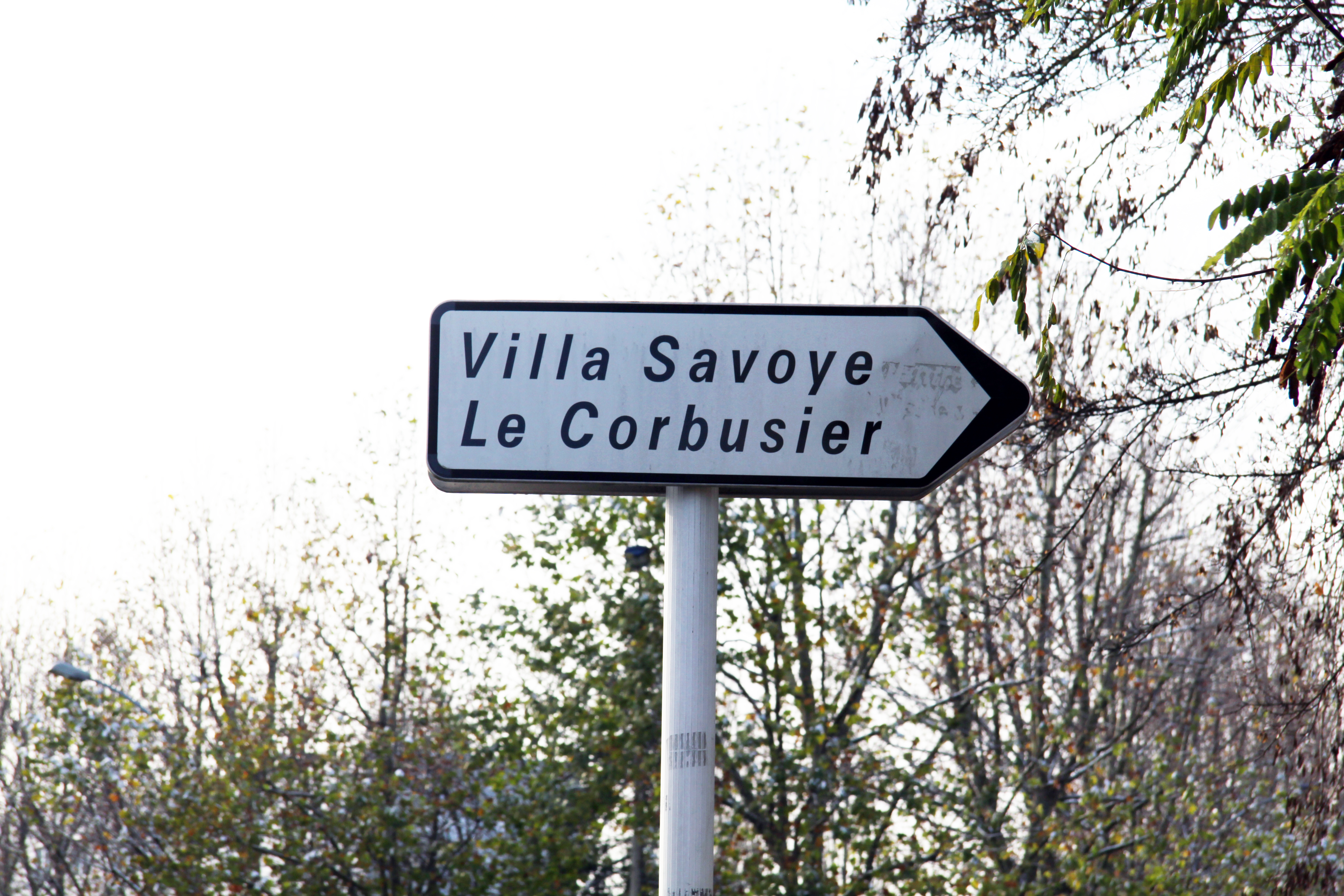 Fotografia realizzata dall'utente di wiki Italia Ing.Manga, ovvero me stesso, scattata in prossimità della Villa Savoye ad un cartello stradale che ne indica la direzione.